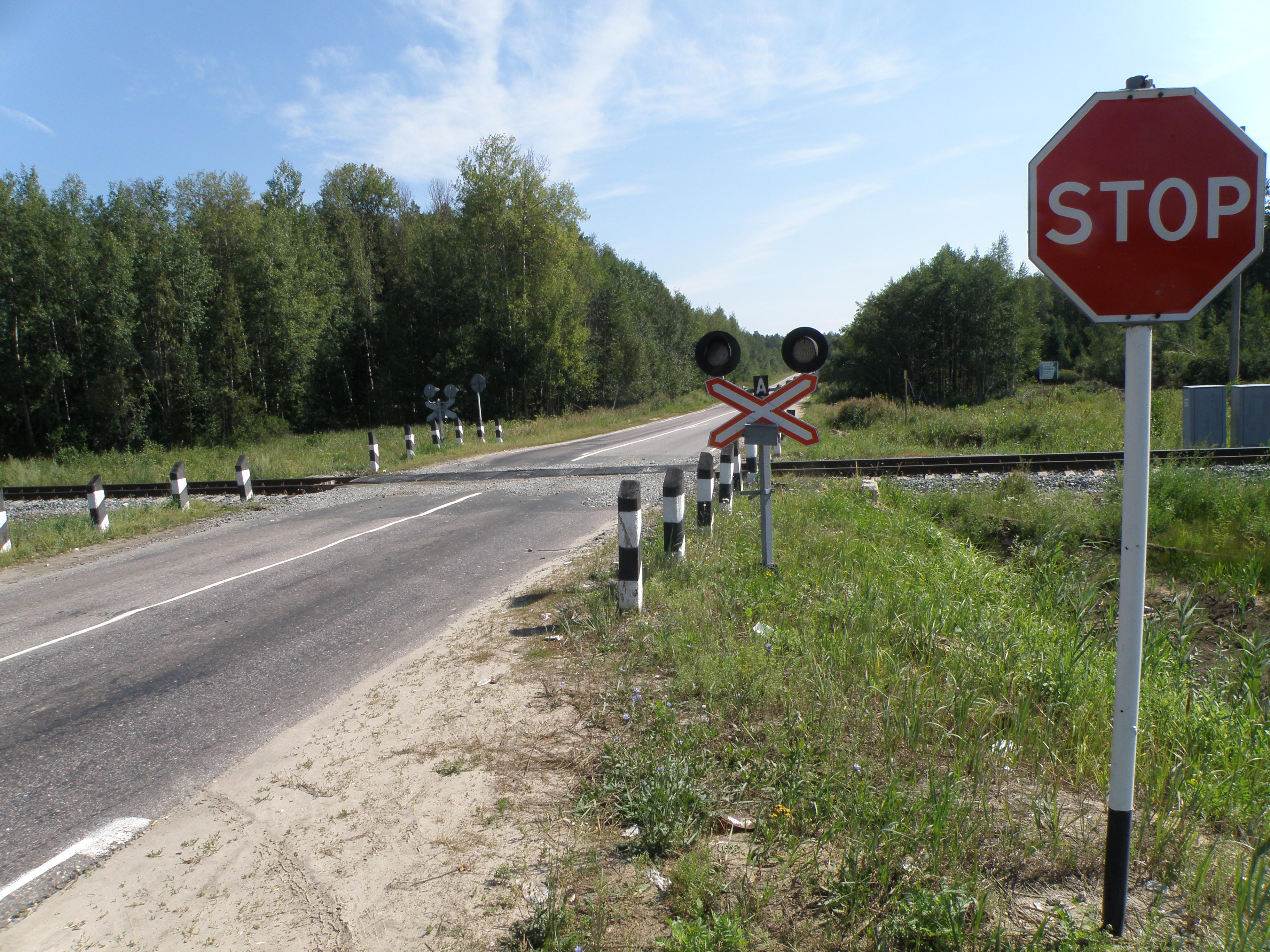 Переезд на южной окраине г. Курлово